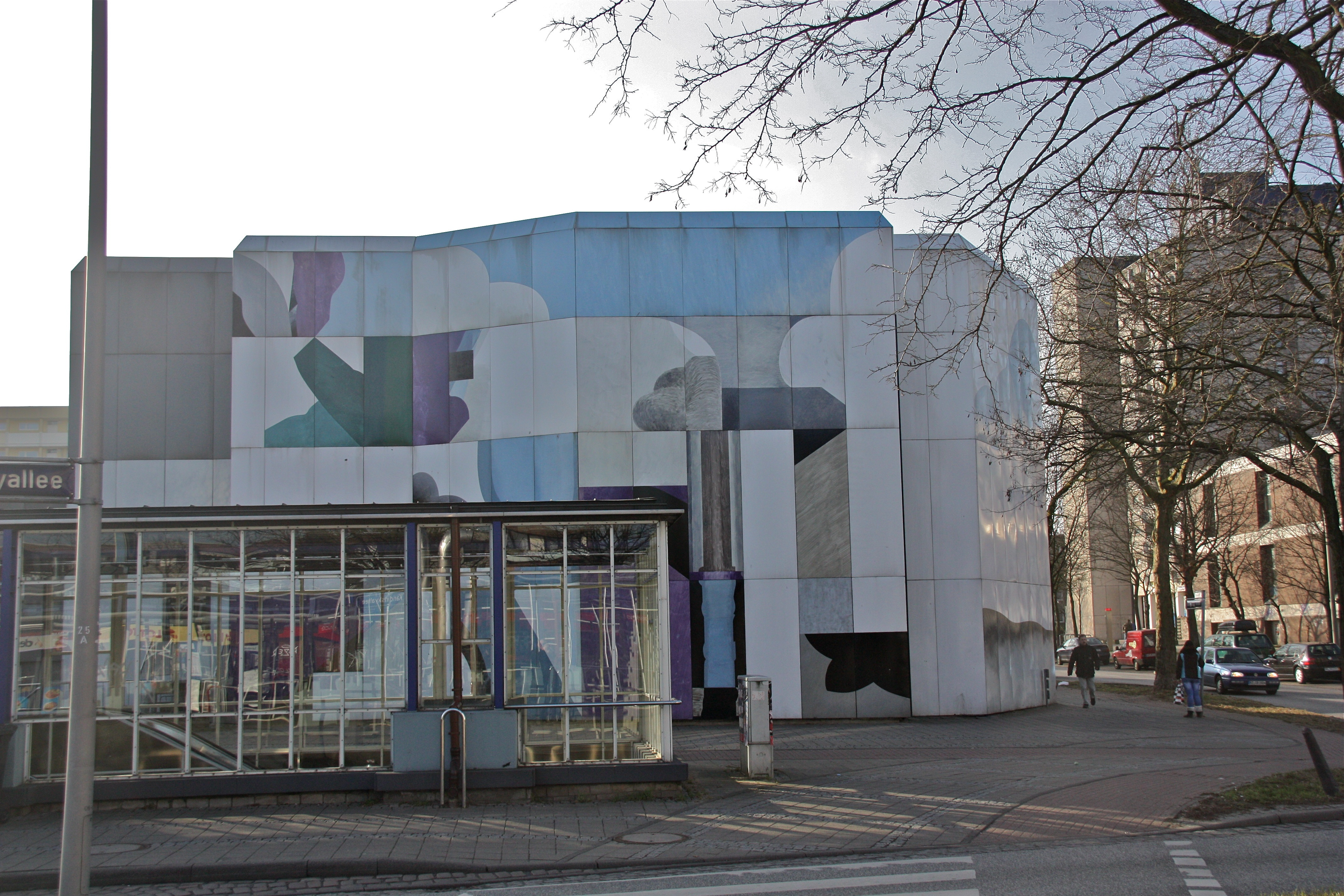 Hamburg, Billstedt, Mümmelmannsberg, Evangelisches Gemeindezentrum, Front zur Kandinskyallee, im Vordergrund der Eingang zur U-Bahn